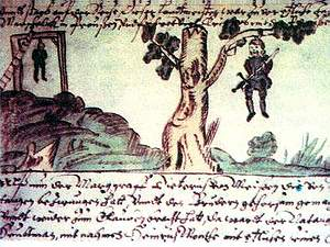 Павешаны і працяты мячом Генрых Монтэ